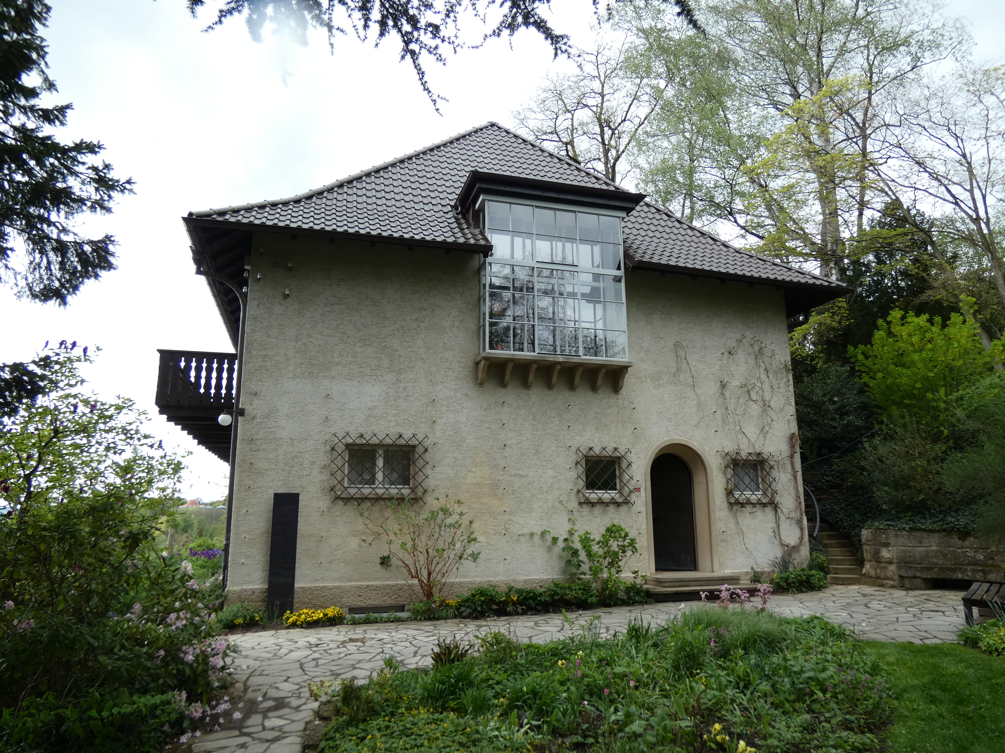 Wohnhaus von Otto Dix in Hemmenhofen, Eingang, heute Museum Haus Dix